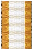 Eigen tekening van het oude lint